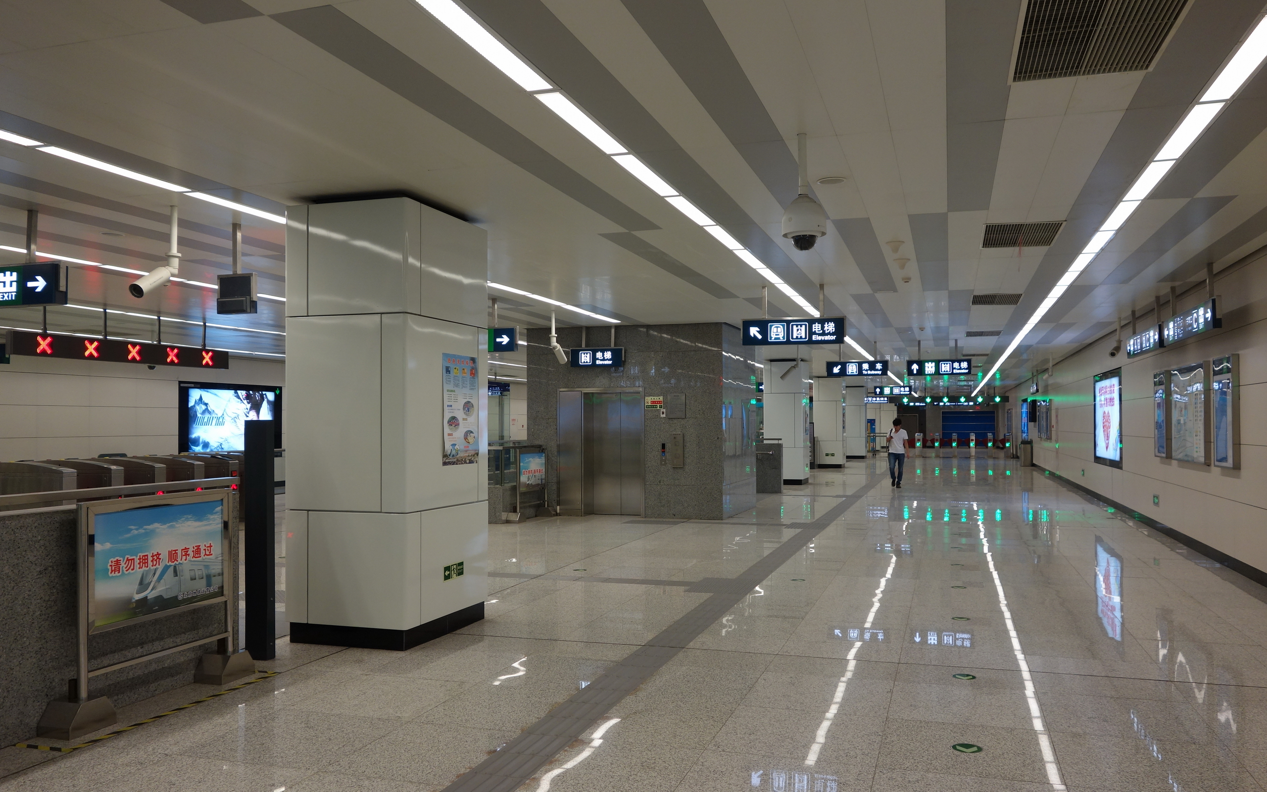 泥洼站站厅层